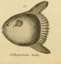 Старинное изображение обыкновенной рыбы-луны (1838) как Orthragoriscus mola